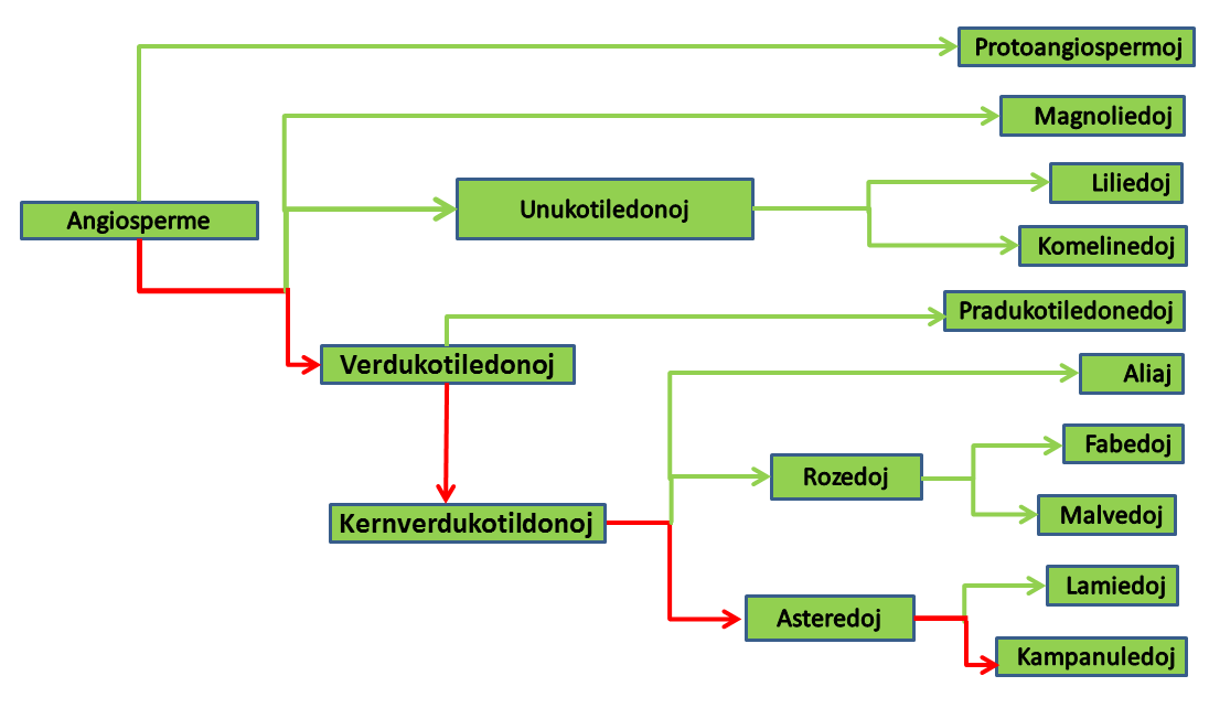 Kampanuledoj